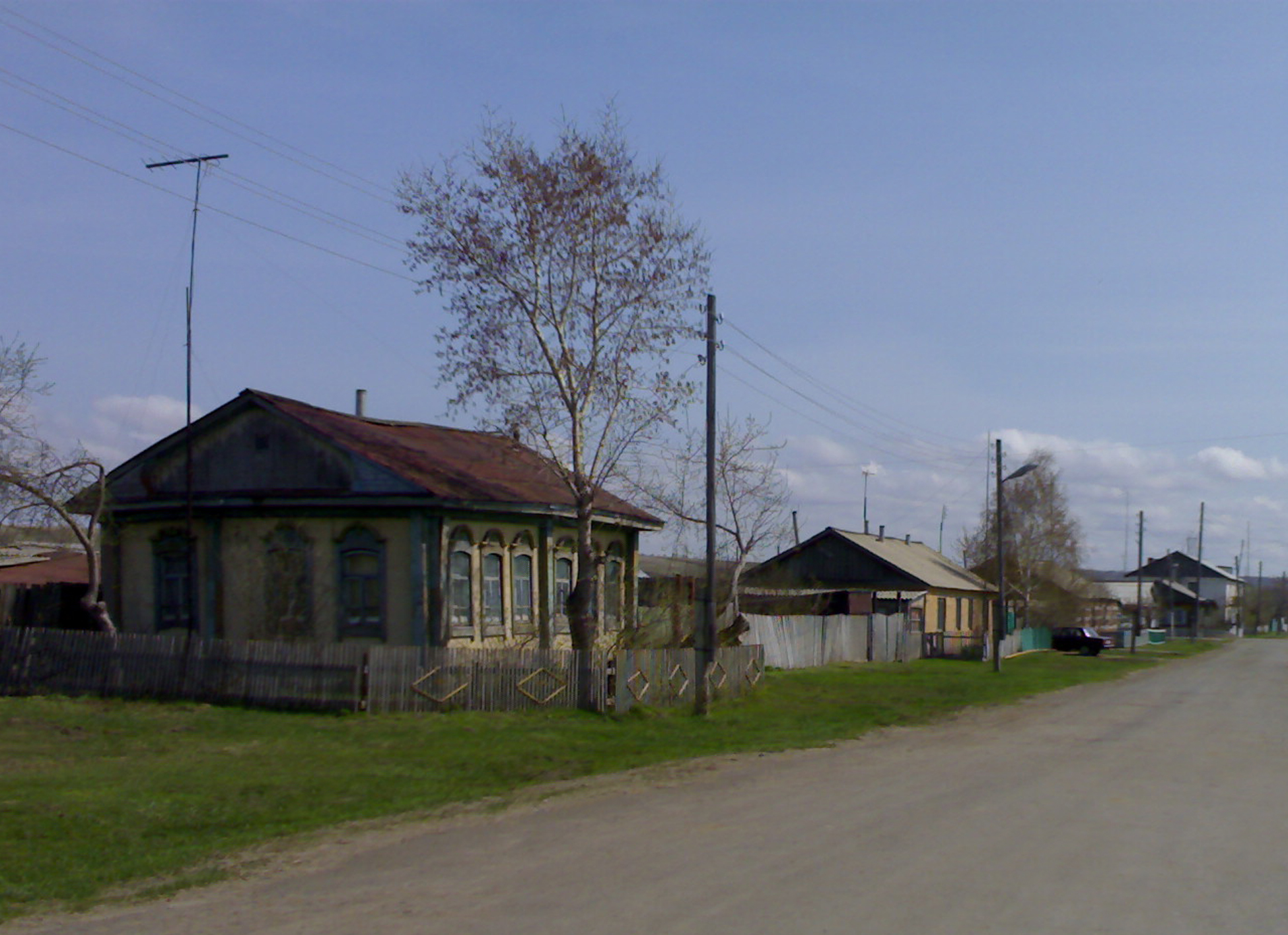 Улица Мира в селе Афонькино Казанского района